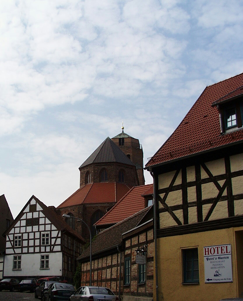 die Stadt